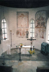 Altarraum von St. Nikolaus - mit den mittelalterlichen Fresken